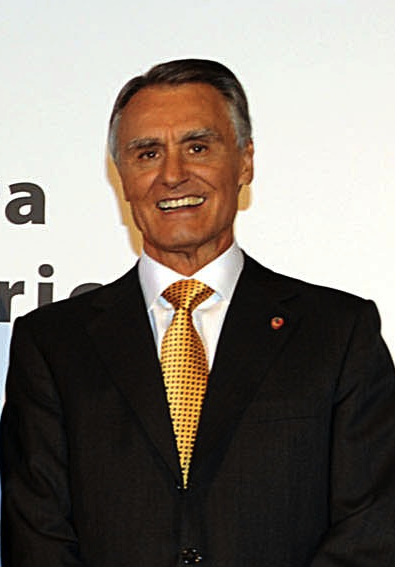 Le président portugais, Anibal Cavaco Silva, en 2009.